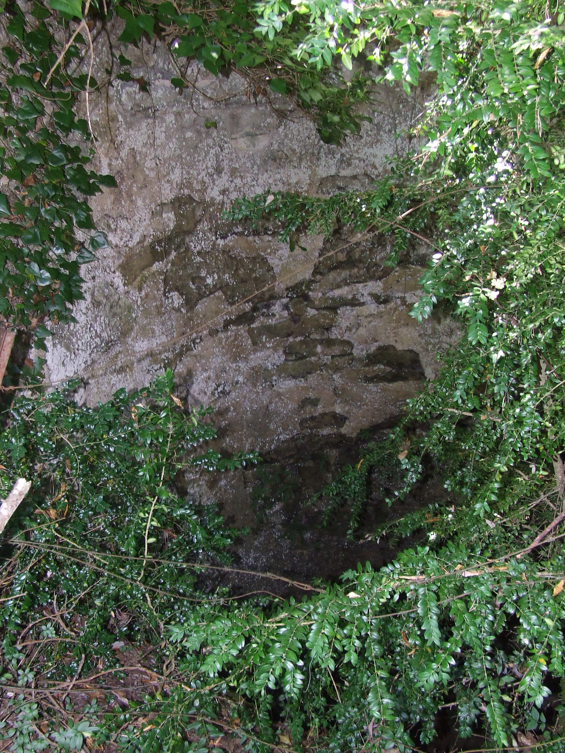 El Molí Nou del Bosc (Castellcir, Moianès)